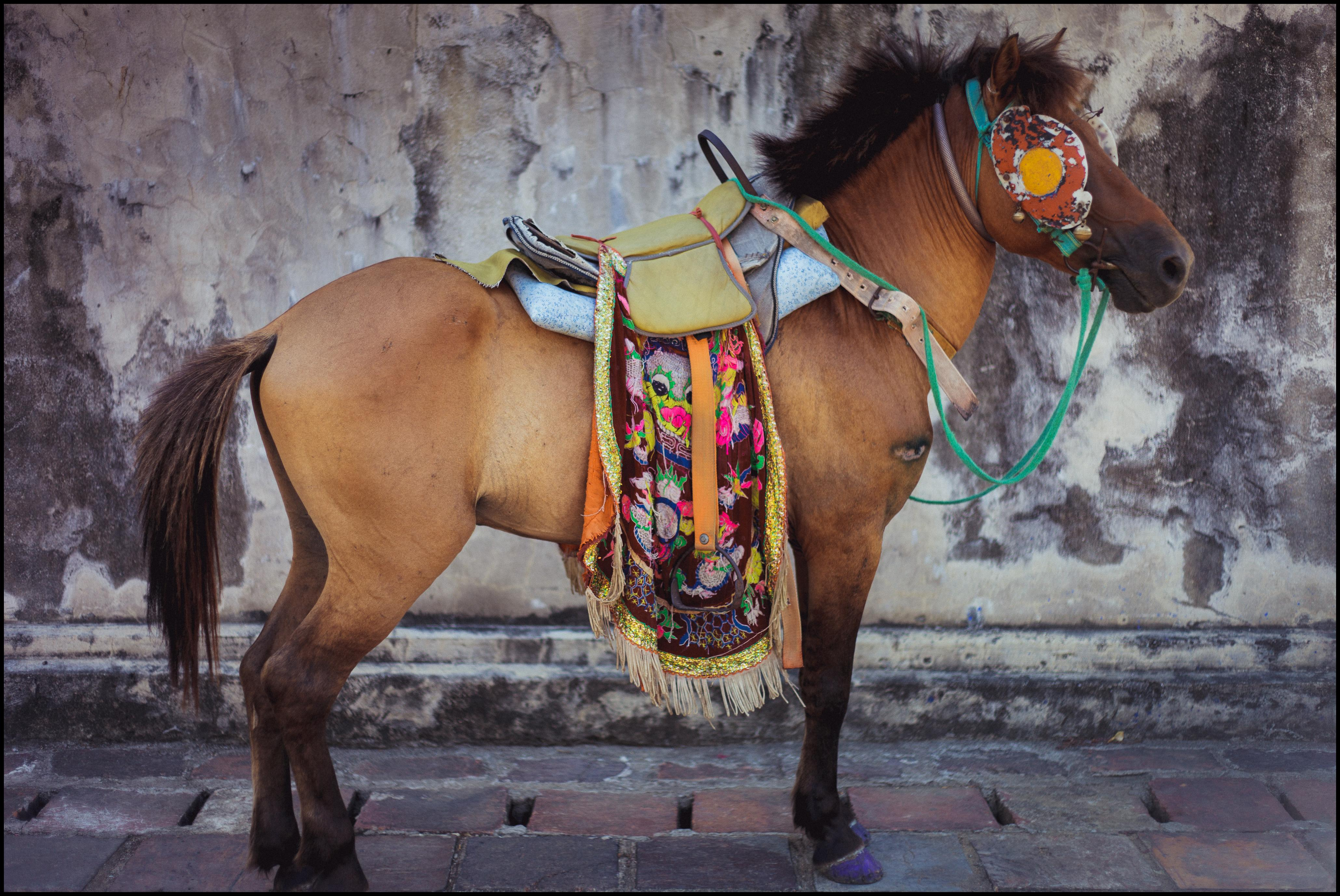 Huế, Vietnam